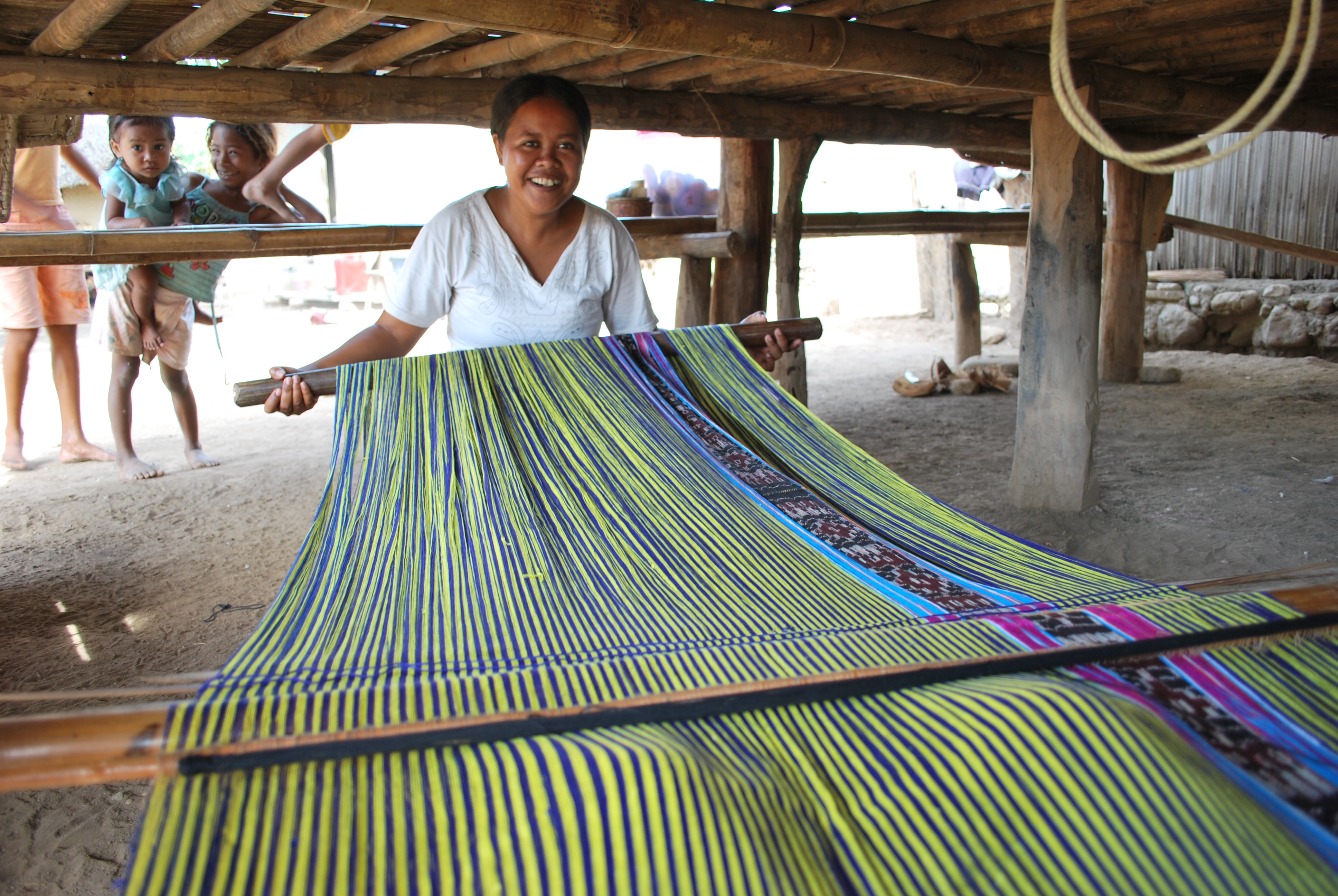 Tais weben in Cova Lima